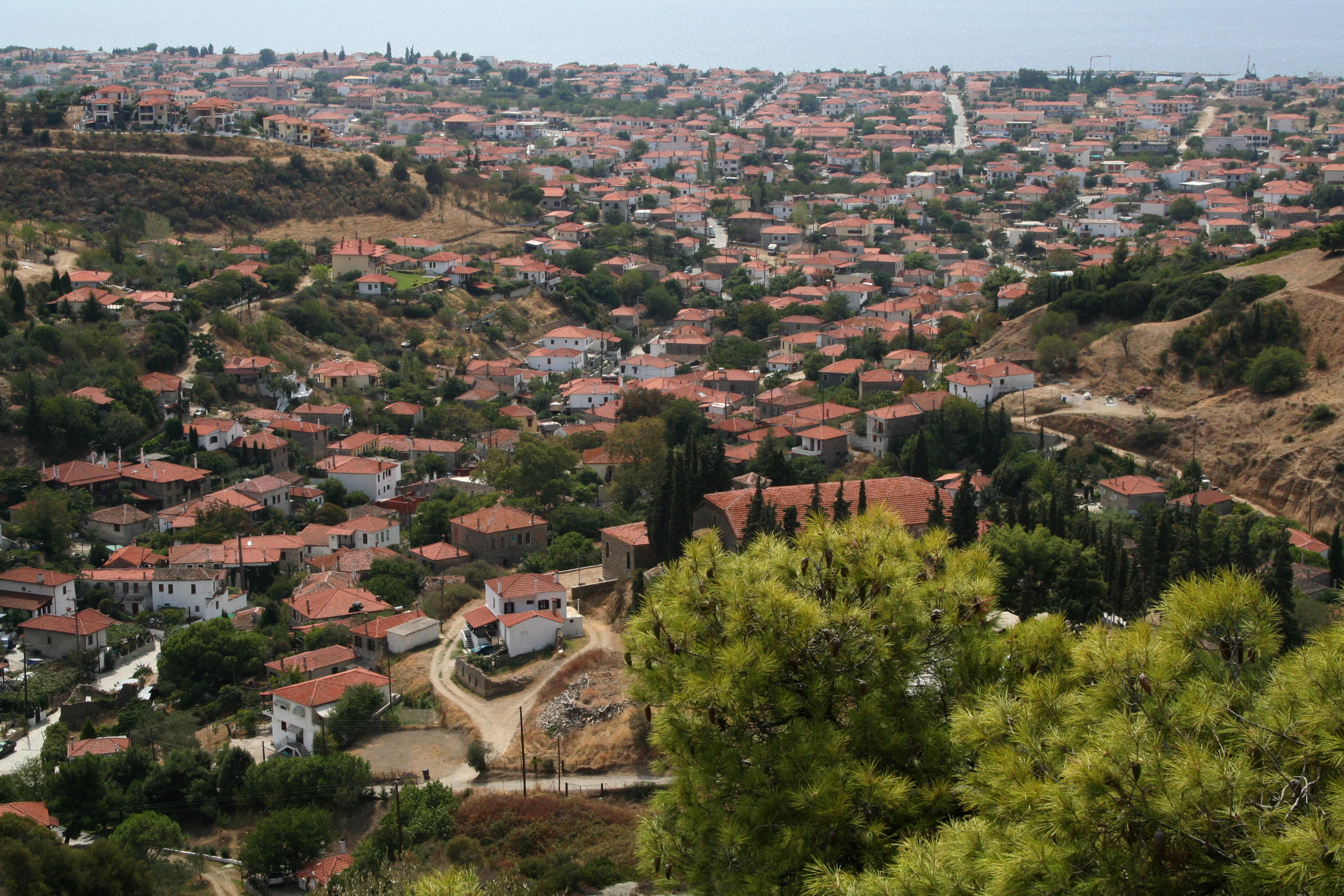 Nikíti. Im Vordergrund Alt-Nikíti mit Kirche und Friedhof.